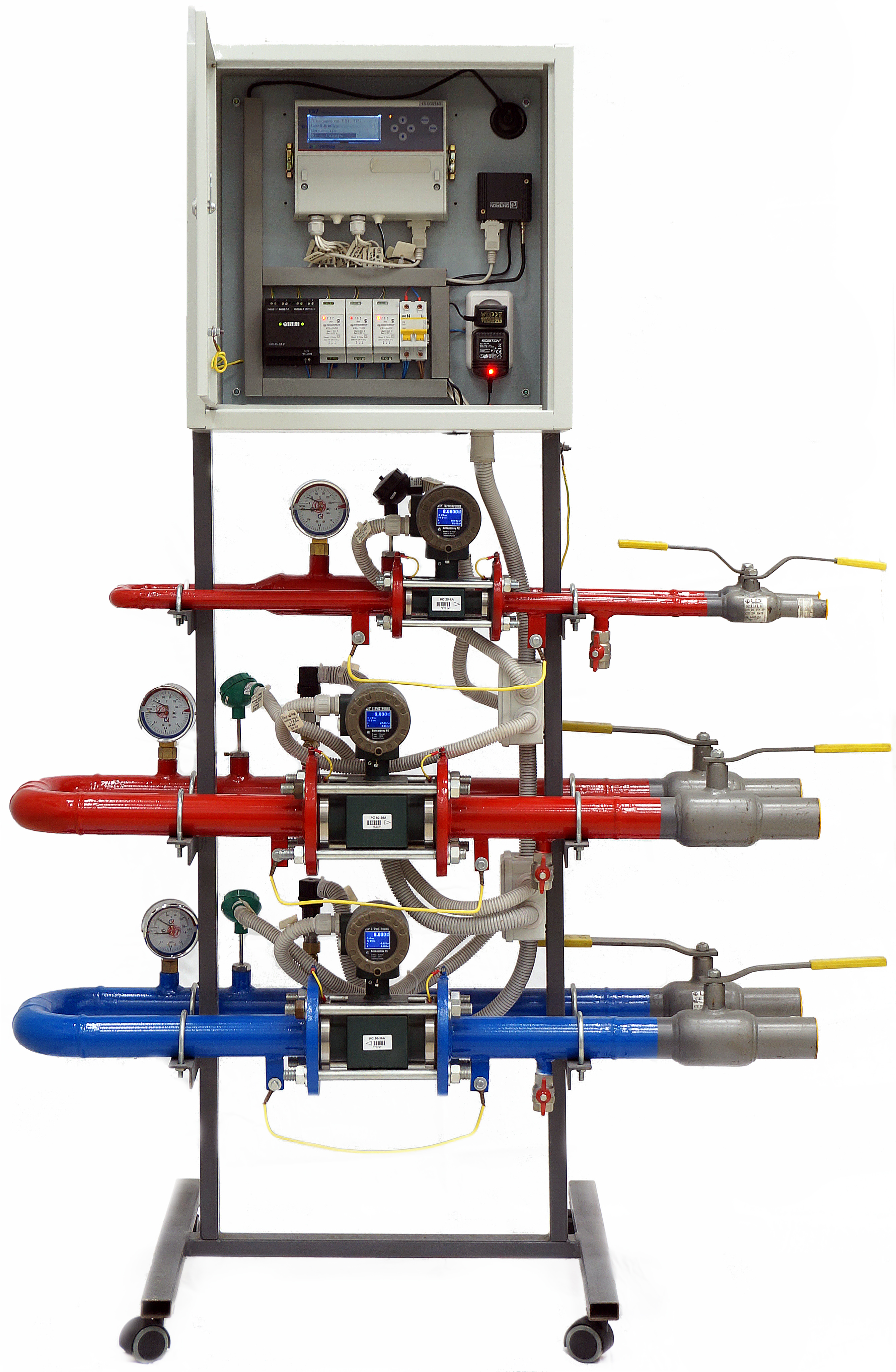 Образец узла учета тепла и воды по трубам отопления, горячего и холодного водоснабжения. На каждой трубе установлены датчик расхода воды, термодатчик и датчик давления воды. В щитке сверху установлены теплосчетчик и модем для централизованного сбора данных. Снизу в щитке смонтировано электропитание узла.